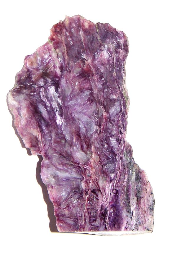 oszlifowany czaroit w formie zgładu. Wymiary próbki 7,5 x 4 cm